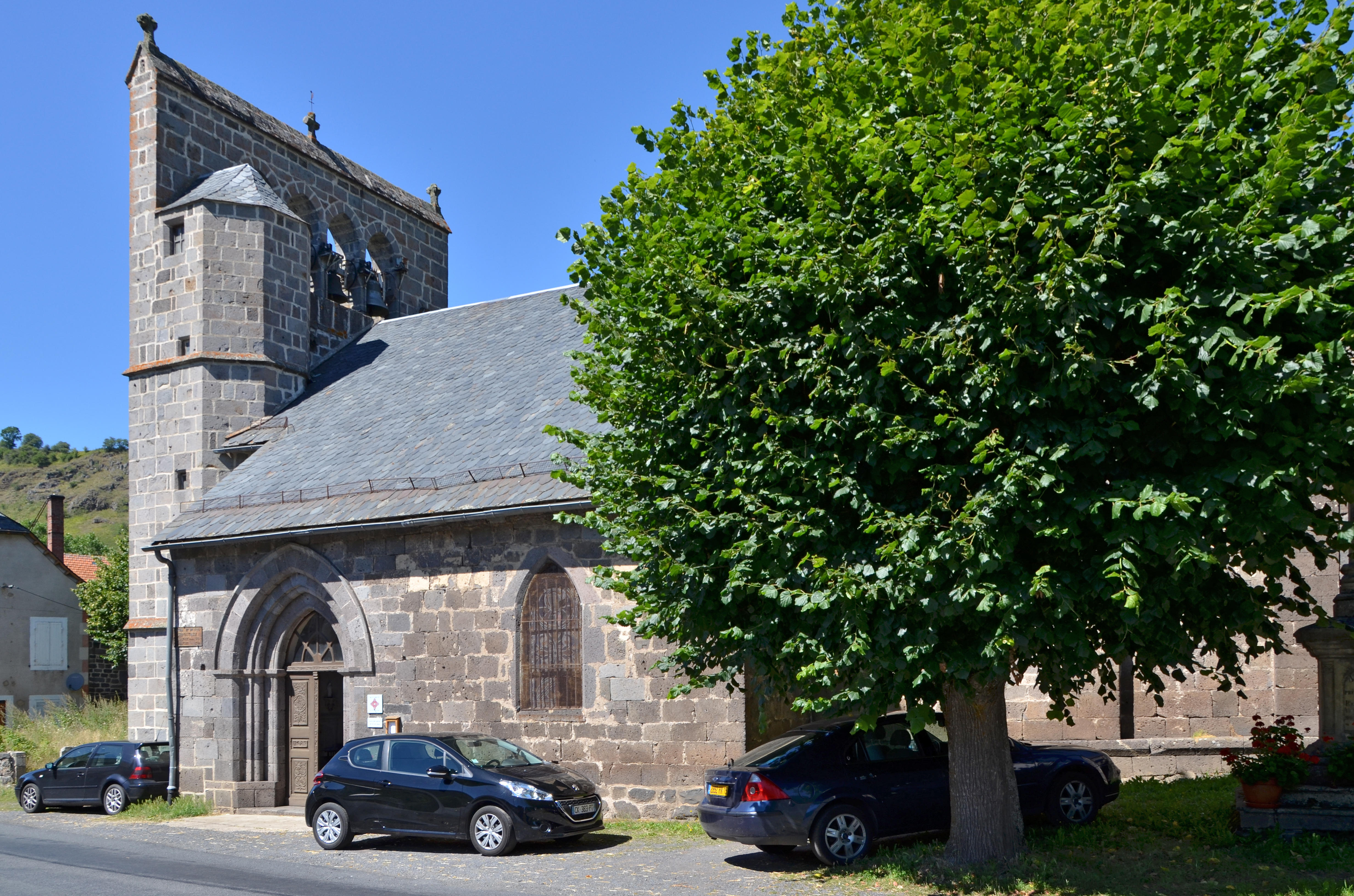 Église de Sainte Anastasie, Cantal, France